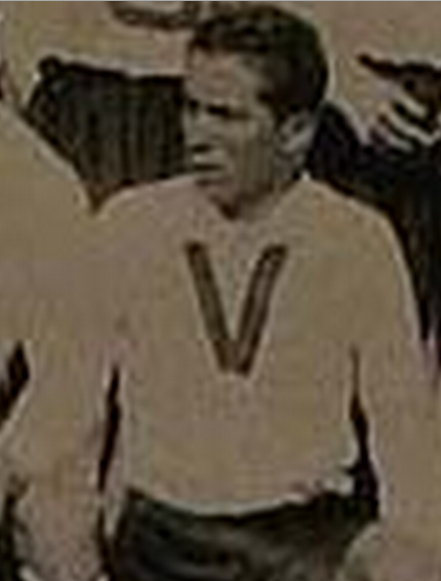 Segundo Durandal en el mundial 1930.